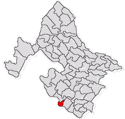 Categorie:Hărţi ale judeţului Mehedinţi